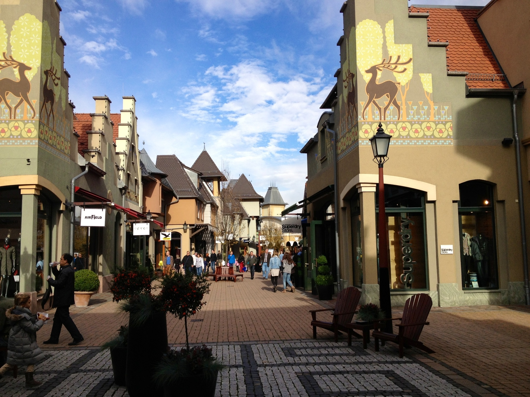 Konsumtempel Wertheim Village